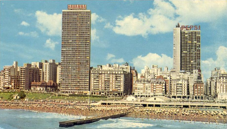 Vista de la Plas Las Toscas en Mar del Plata, con los edificios costeros y, destacándose sobre los demás, los edificios Demetrio Elíades (con letrero de Alfajores Havanna) y Palacio Cosmos (con una publicidad de Pepsi).